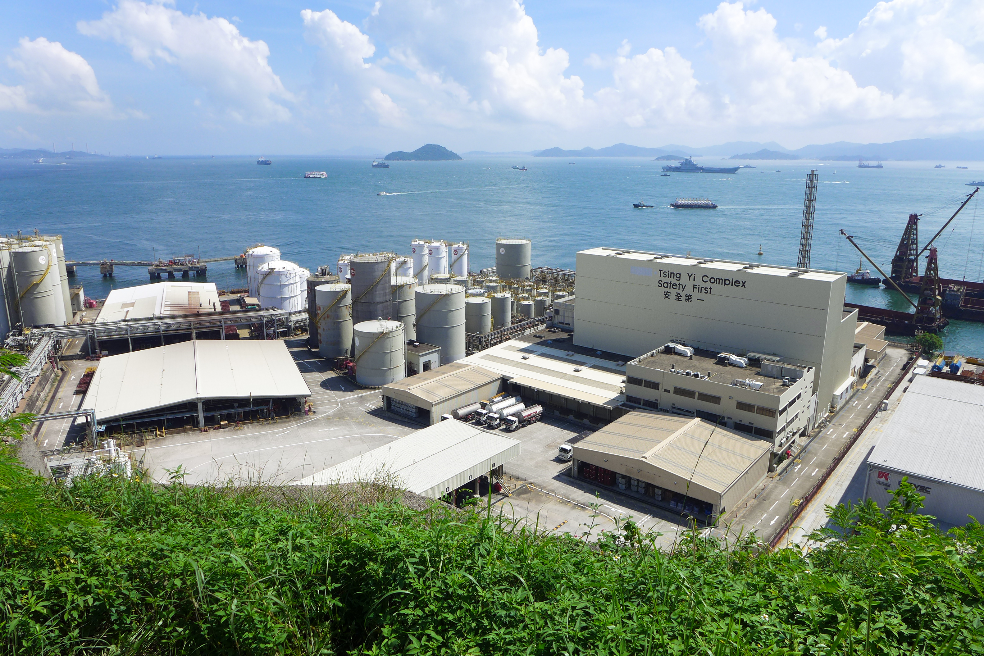 Mobil Oil Depot